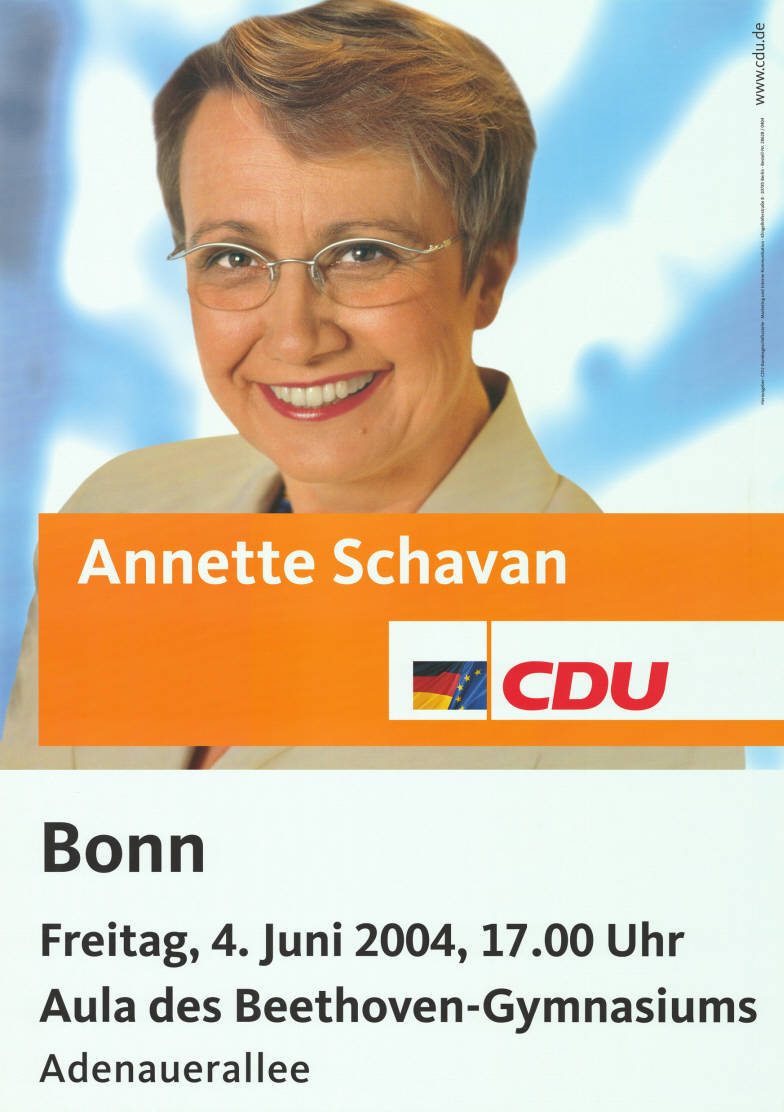 Annette Schavan CDU ... Abbildung: Porträtfoto Plakatart: Ankündigungsplakat Auftraggeber: CDU-Bundesgeschäftsstelle, Marketing und Interne Kommunikation, Berlin Objekt-Signatur: 10-030 : 1208 Bestand: Europawahlplakate (10-030) GliederungBestand10-18: Europawahlplakate (10-030) » CDU Lizenz: KAS/ACDP 10-030 : 1208 CC-BY-SA 3.0 DE